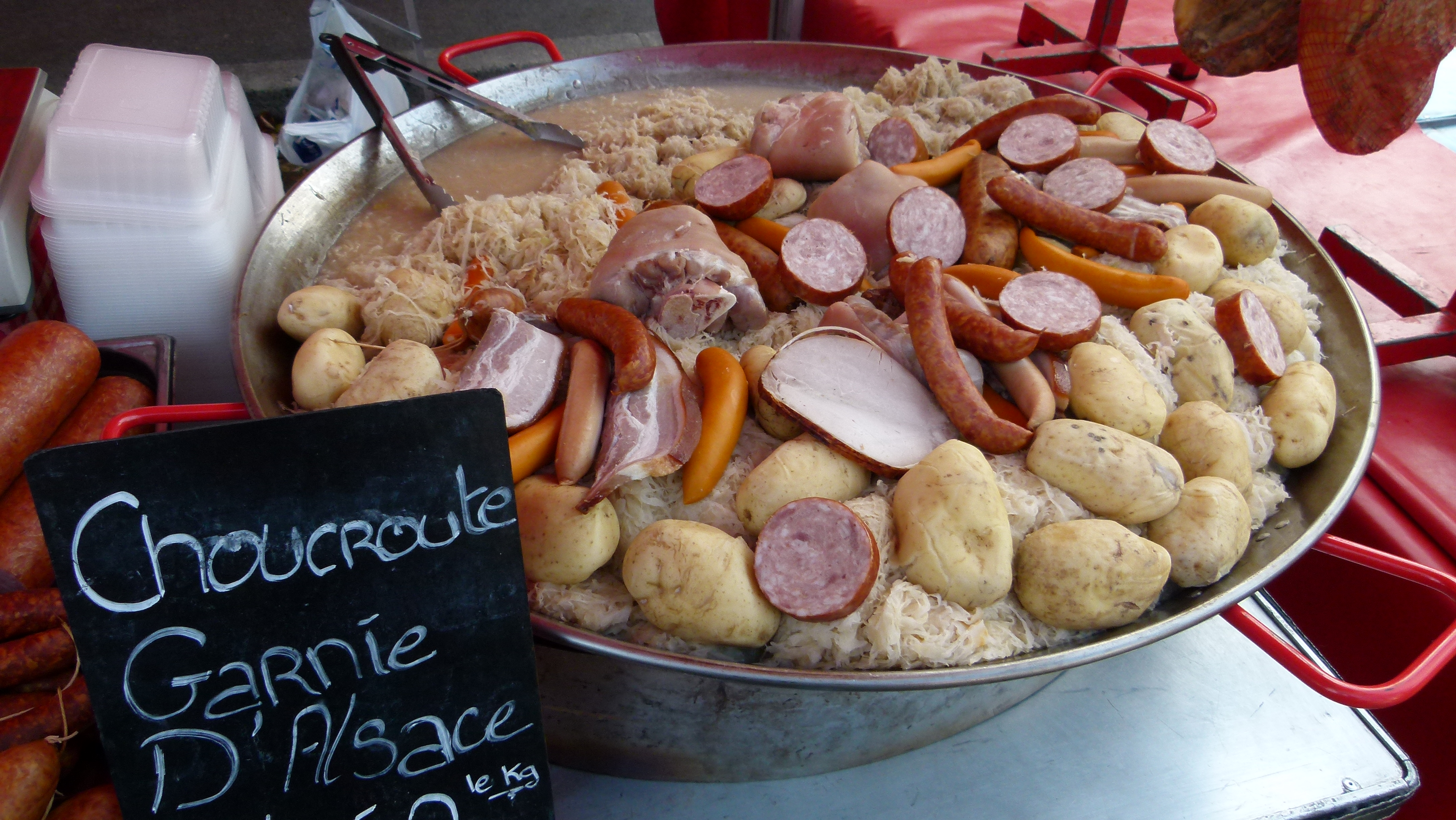 Choucroute garni d'Alsace